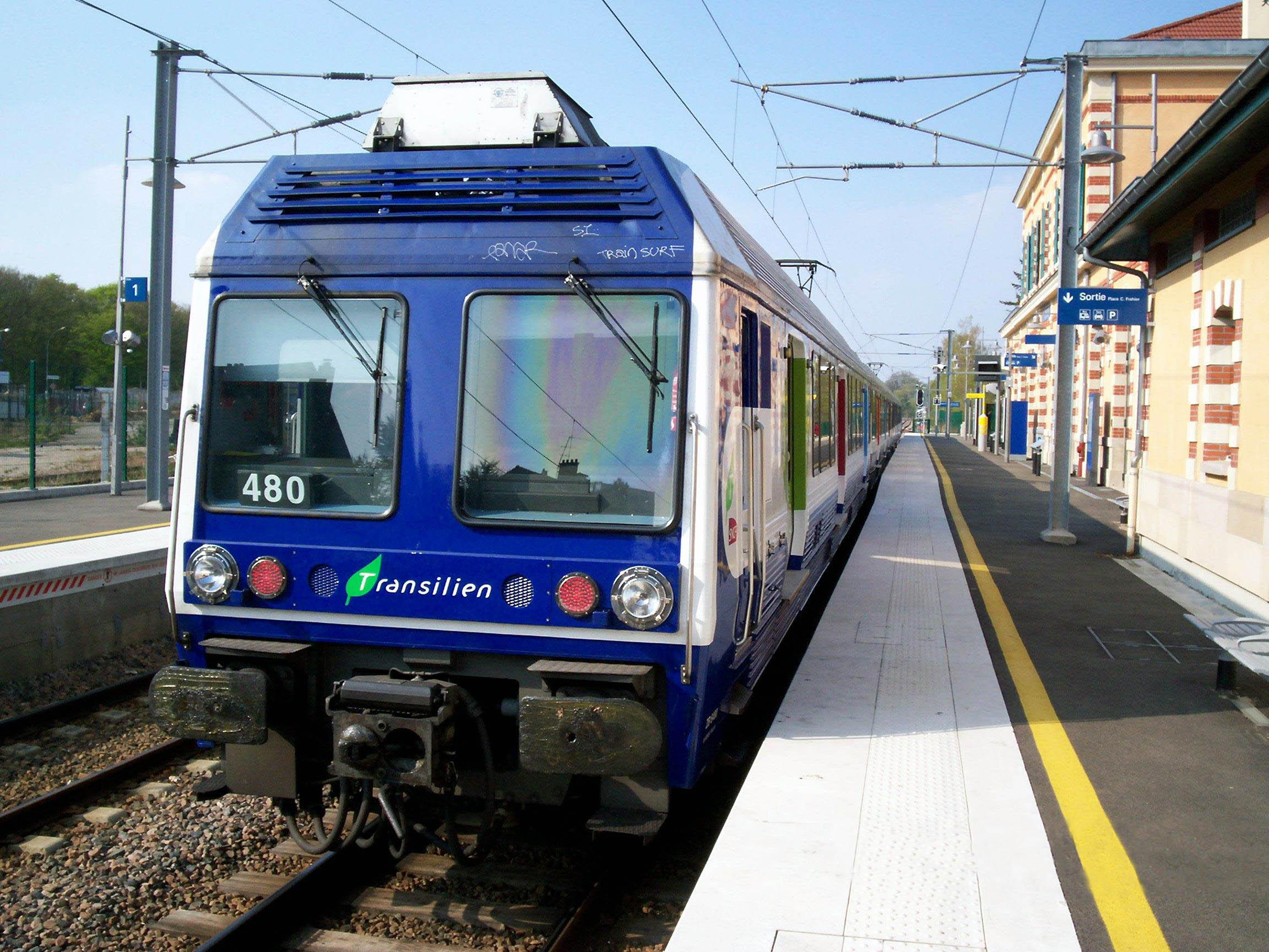 Photo d'une rame en gare terminus de Saint-Germain en Laye GC